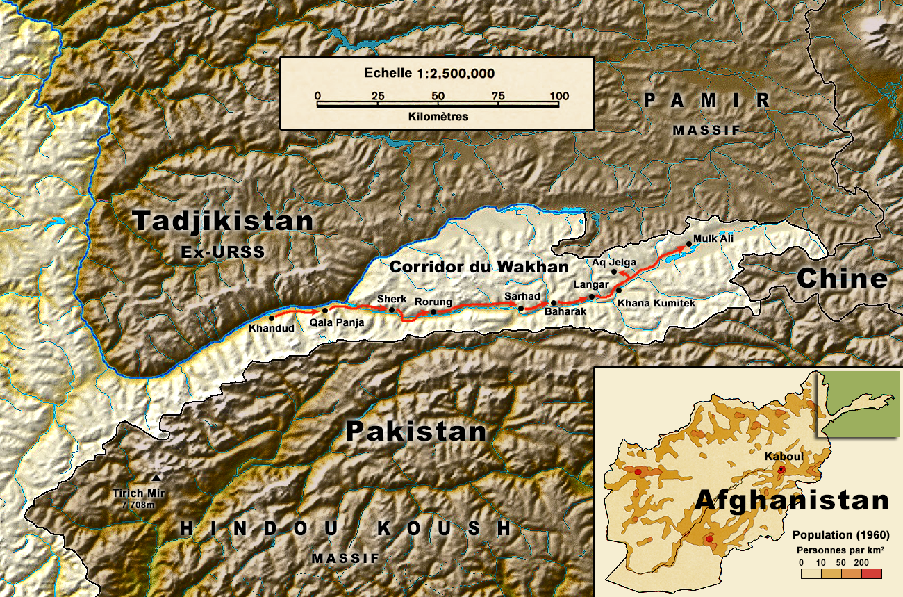 Les 9 étapes du voyage de Sabrina et Roland Michaud lorsqu'ils ont rejoint en janvier 1971 une caravane de nomades kirghizes.